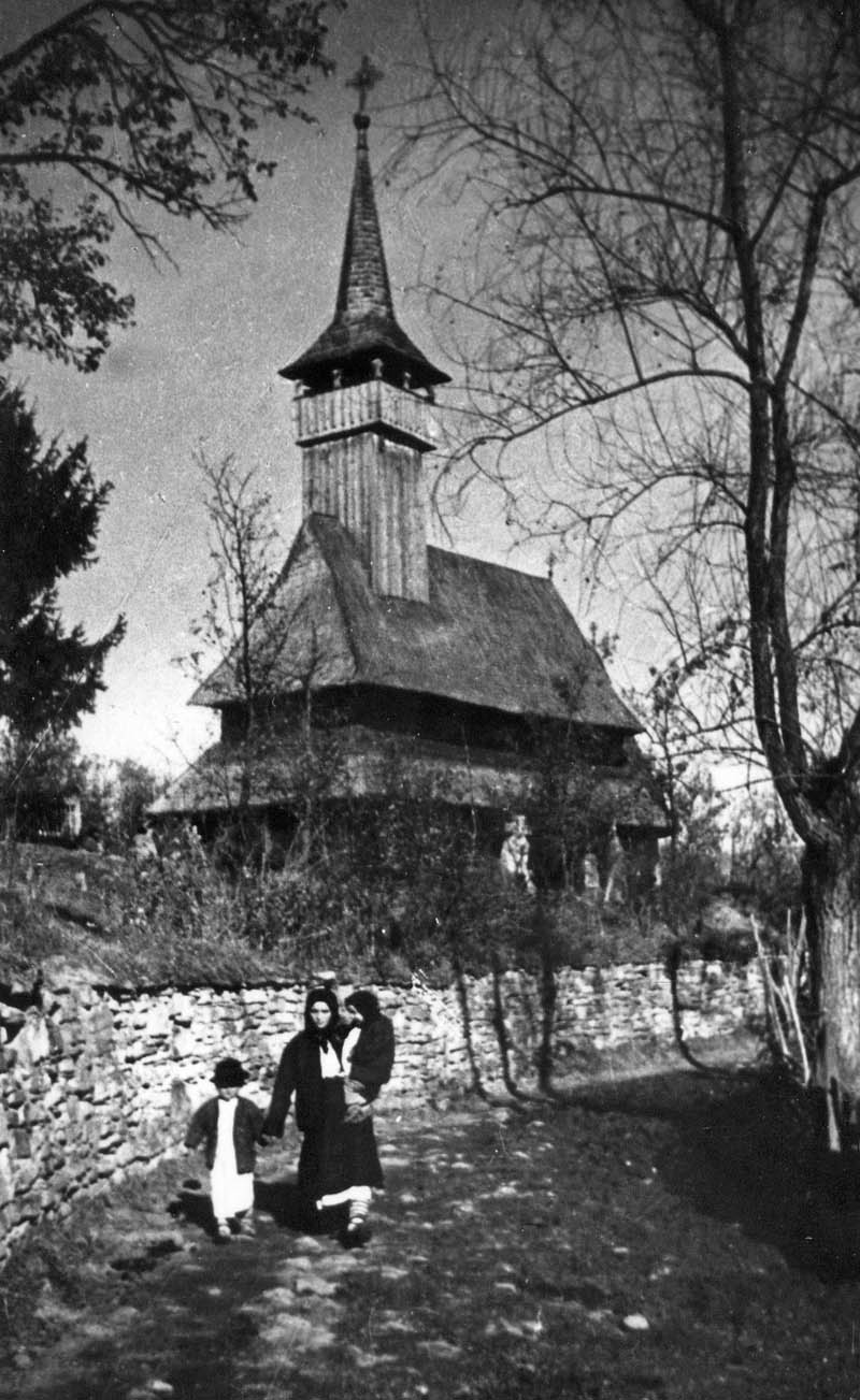 Ieud Deal, biserica de lemn din uliţa Besericii la mijlocul secolului 20. Foto: Francisc Nistor.